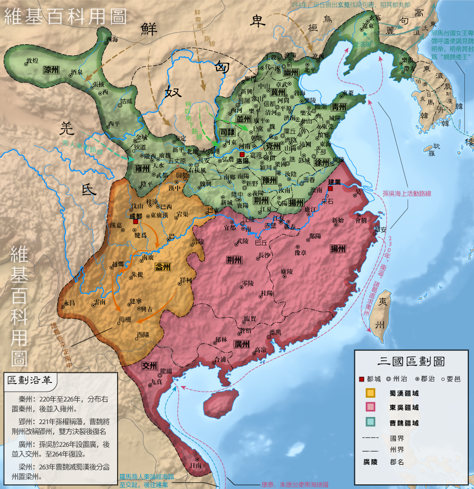 三国